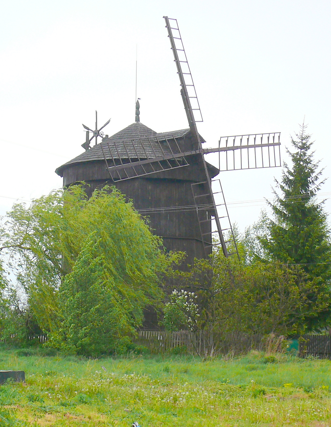 Rogierówko, wiatrak-holener